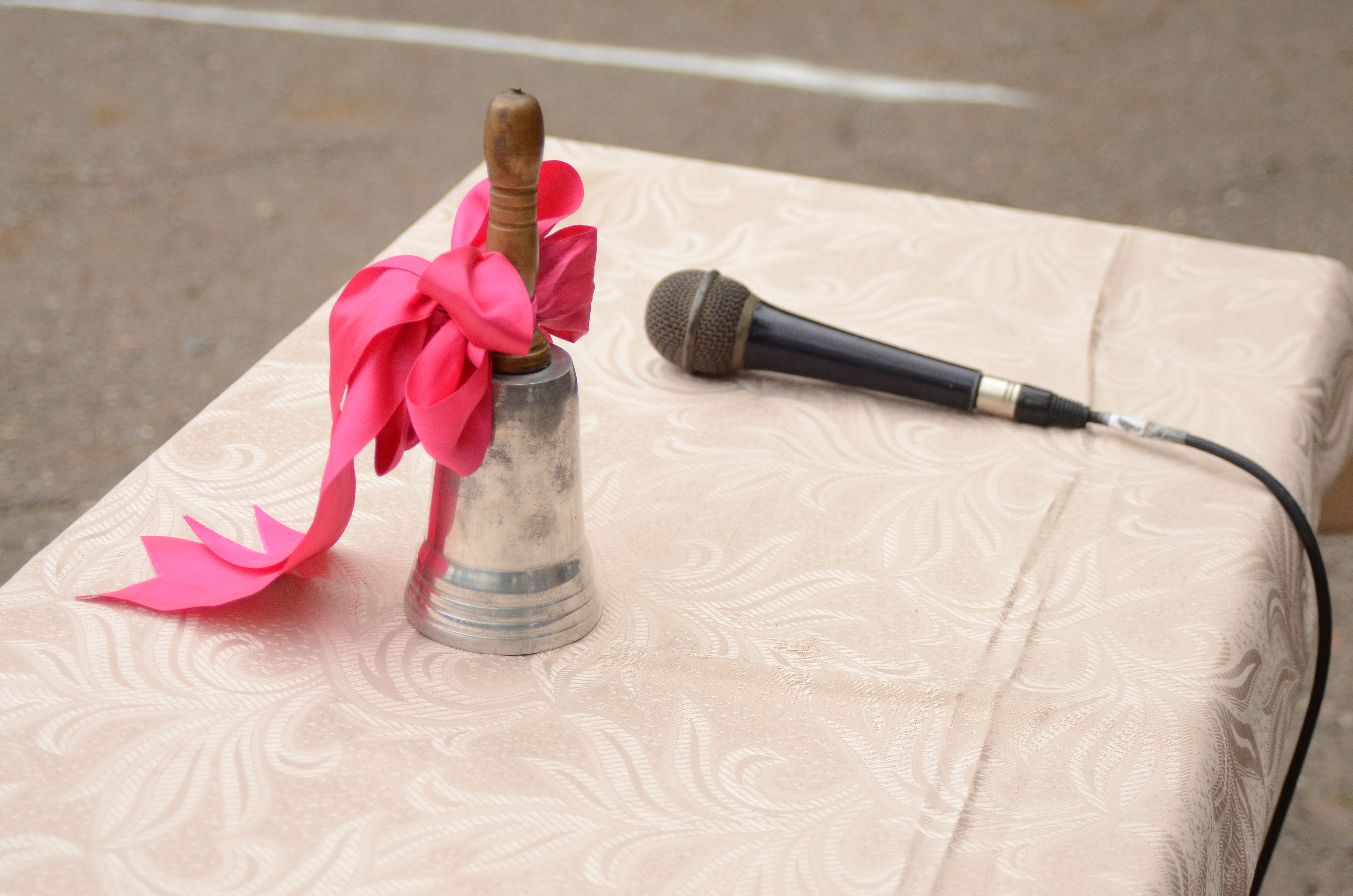 Донецк.